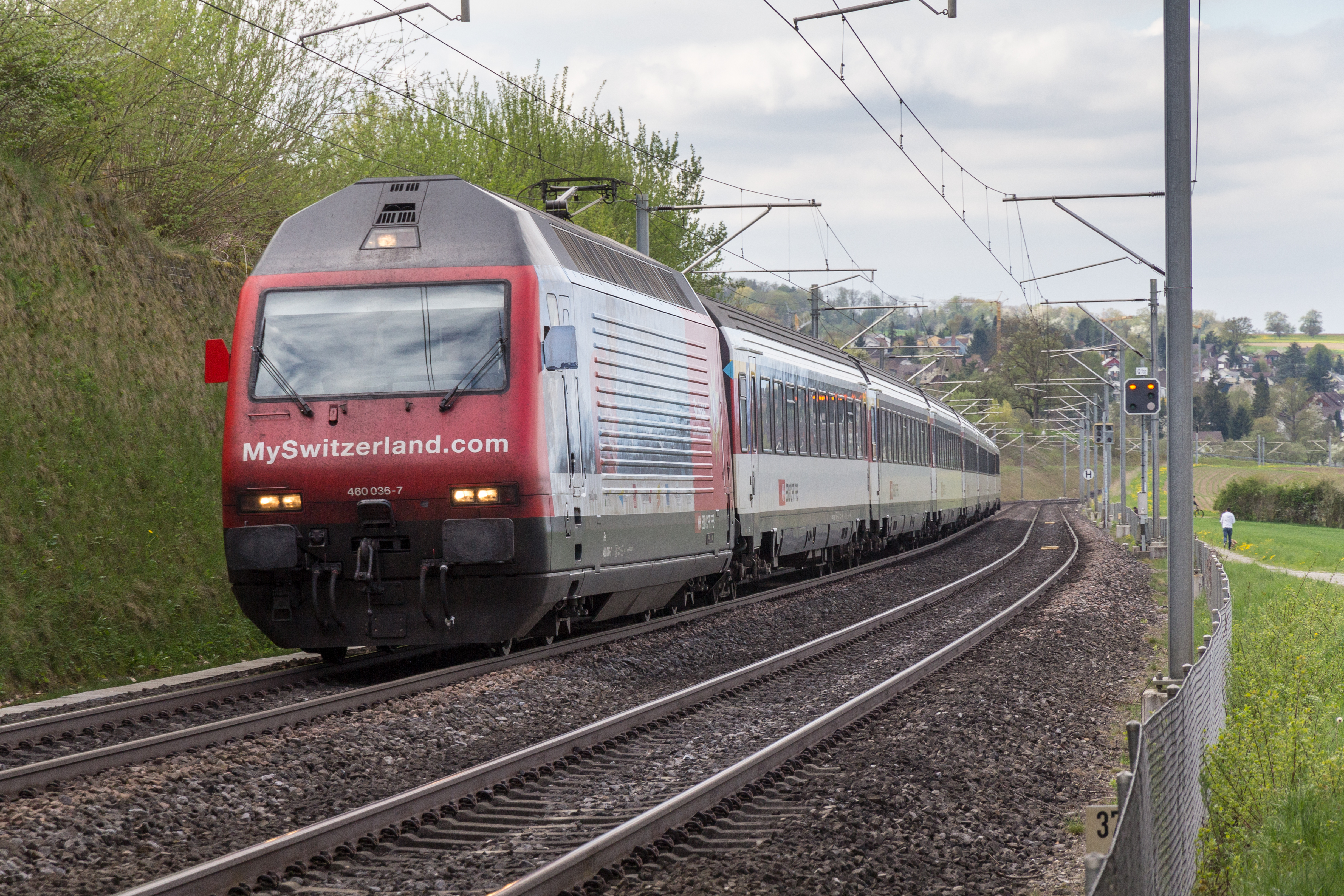 SBB-Interregio auf der ehem. MThB-Strecke Konstanz-Weinfelden im 2-gleisigen Streckenabschnitt zwischen Tägerwilen und Kreuzlingen-Bernrain (2013)